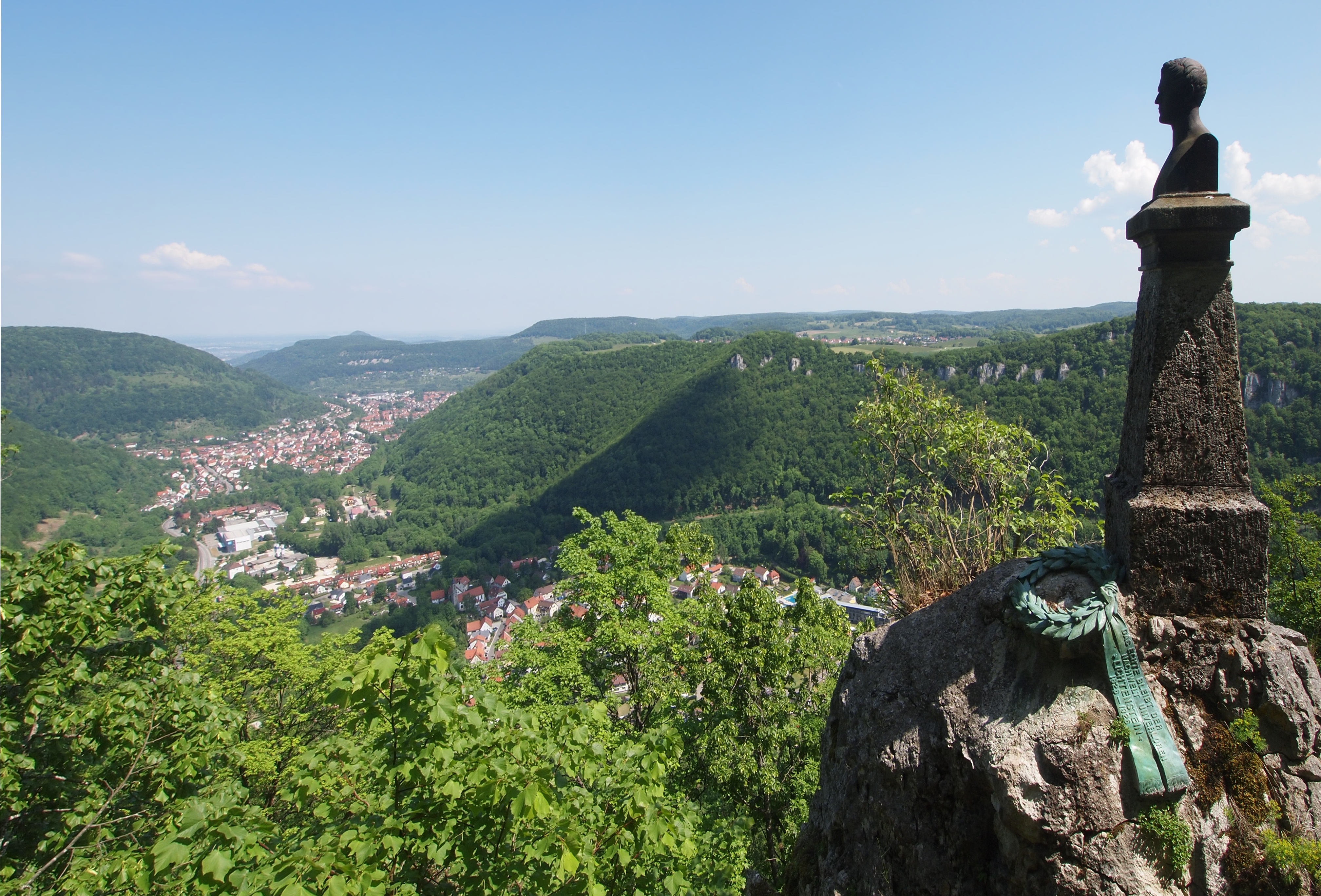 Wilhelm-Hauff-Denkmal bei Lichtenstein vor dem Echaztal